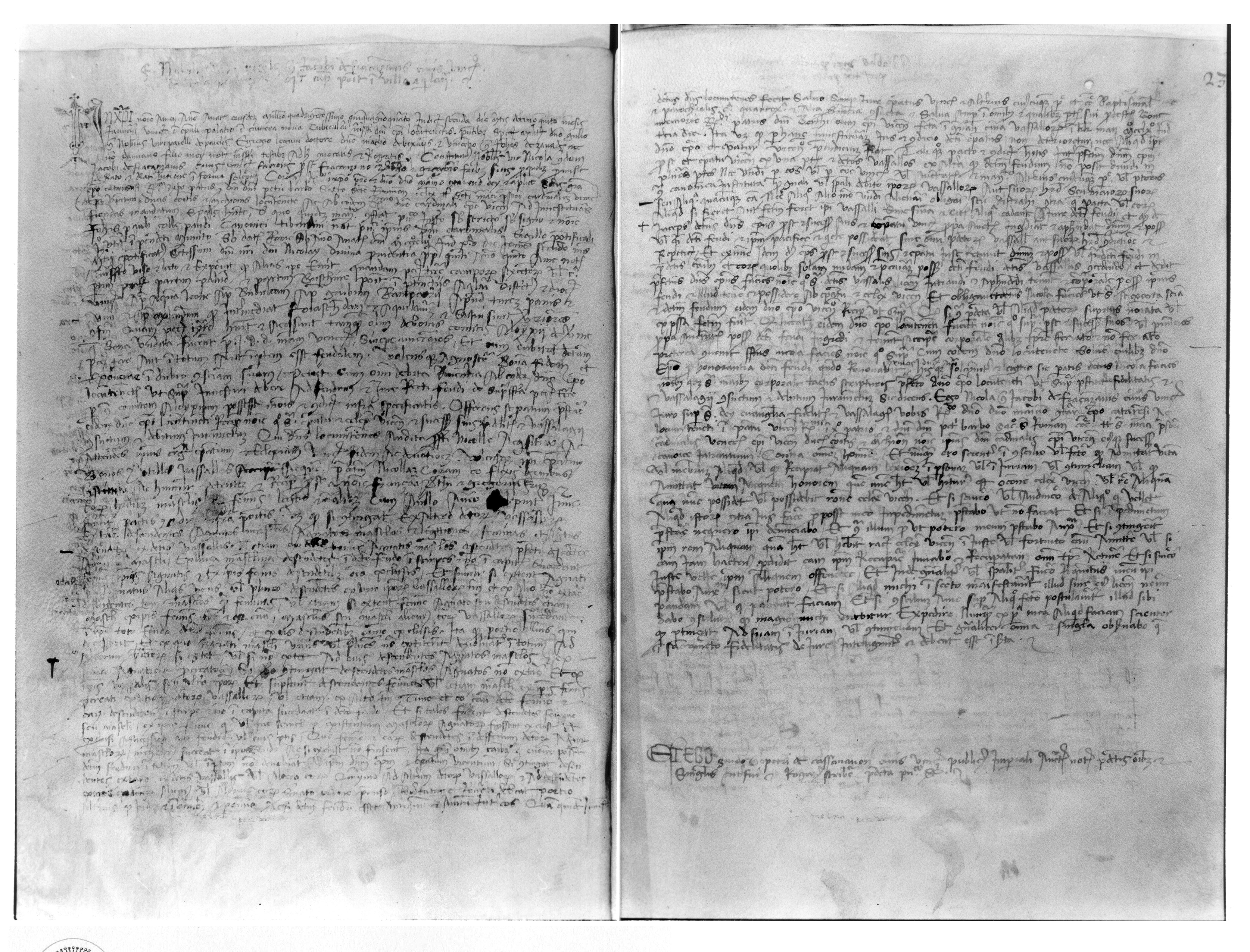 Archivio Capitolare Vicenza, Liber Feudorum, 25 gennaio 1454, investitura di Nicola Fracanzani a Conte di Agugliaro